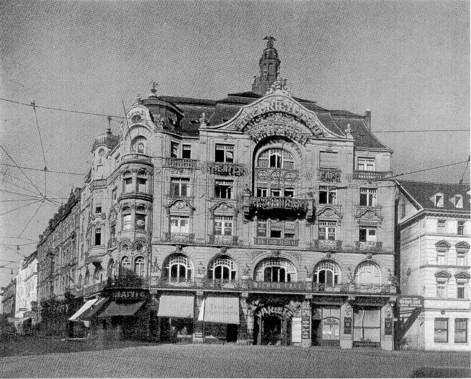 Beschreibung: Friedrichsbau der Brauerei Wulle in Stuttgart